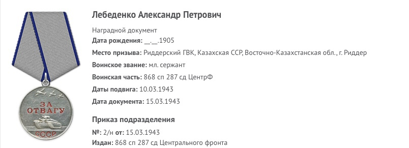 Медаль "За отвагу"